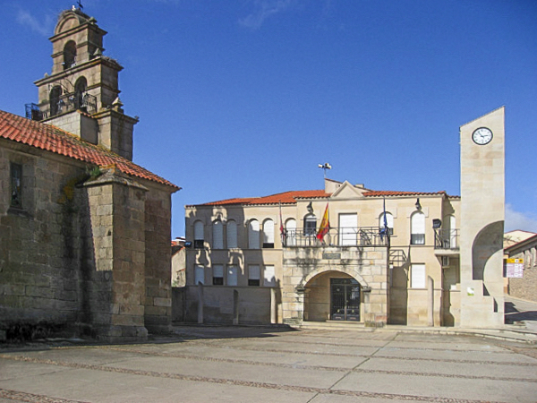 Fotografía de la Sede del Ayuntamiento de Vilvestre